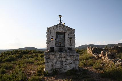 Piló de Sant Gregori (Sucaina, Alt Millars, Castelló)